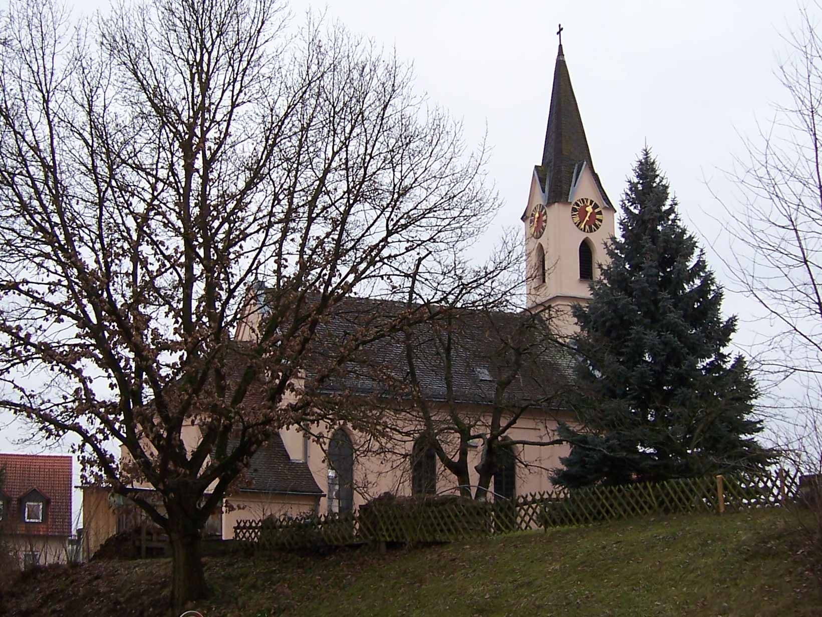 evangelische Kirche Pleinfeld